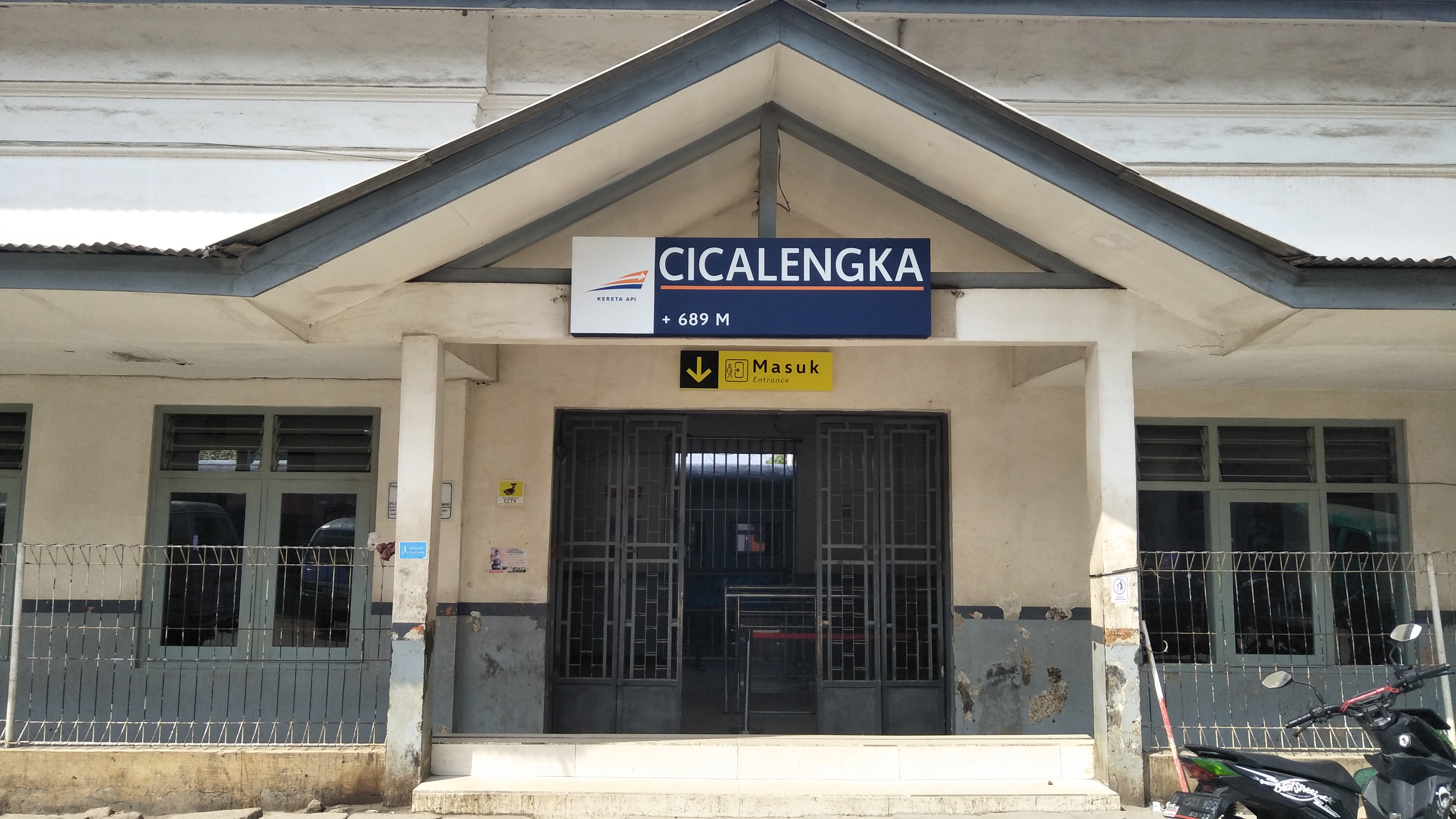 Stasiun Cicalengka dengan papan nama baru versi 2017